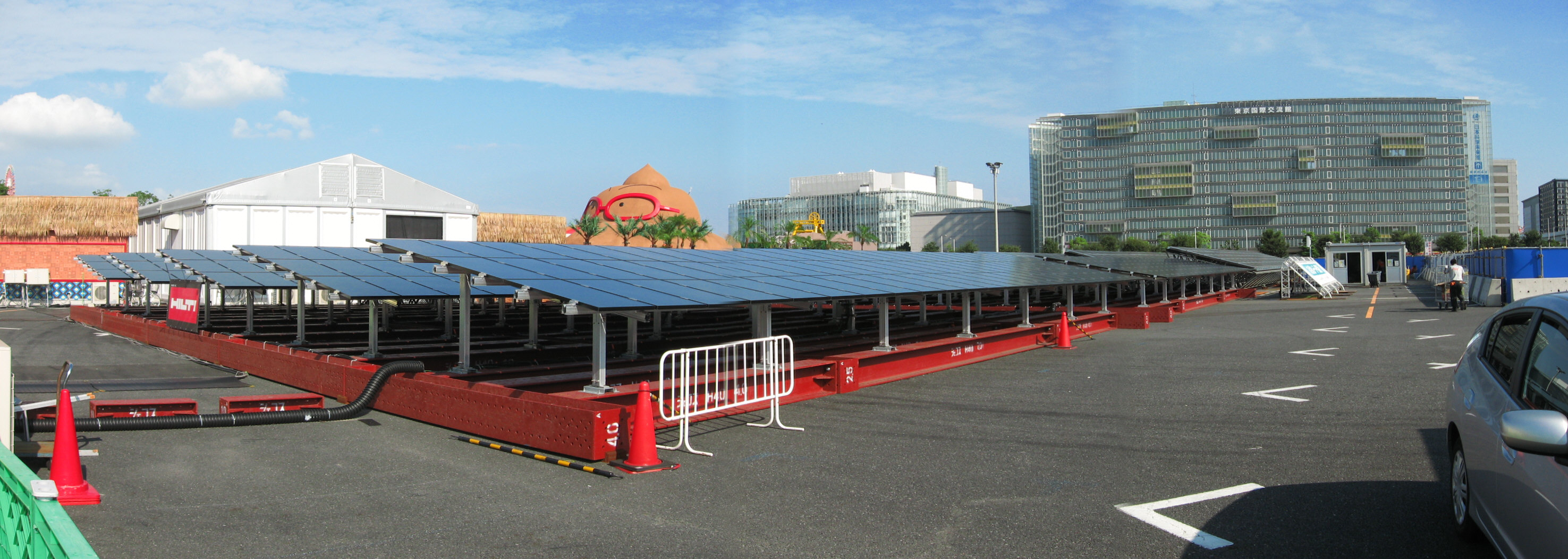 フジテレビの夏イベント「お台場合衆国」より。2011年は、節電のため会場内において太陽光を利用しての発電が行われた。写真は「合衆国サンサンアイランド」内に設置されたソーラーパネル。